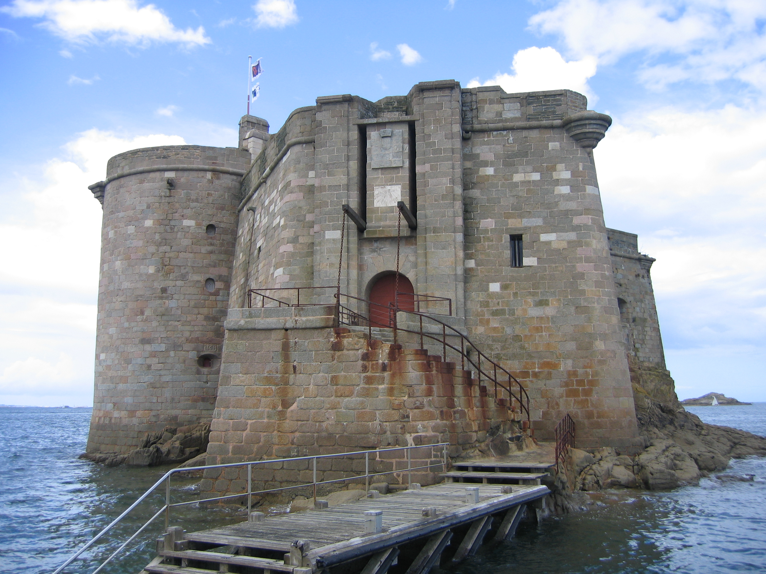 Ponton et entrée du chateau